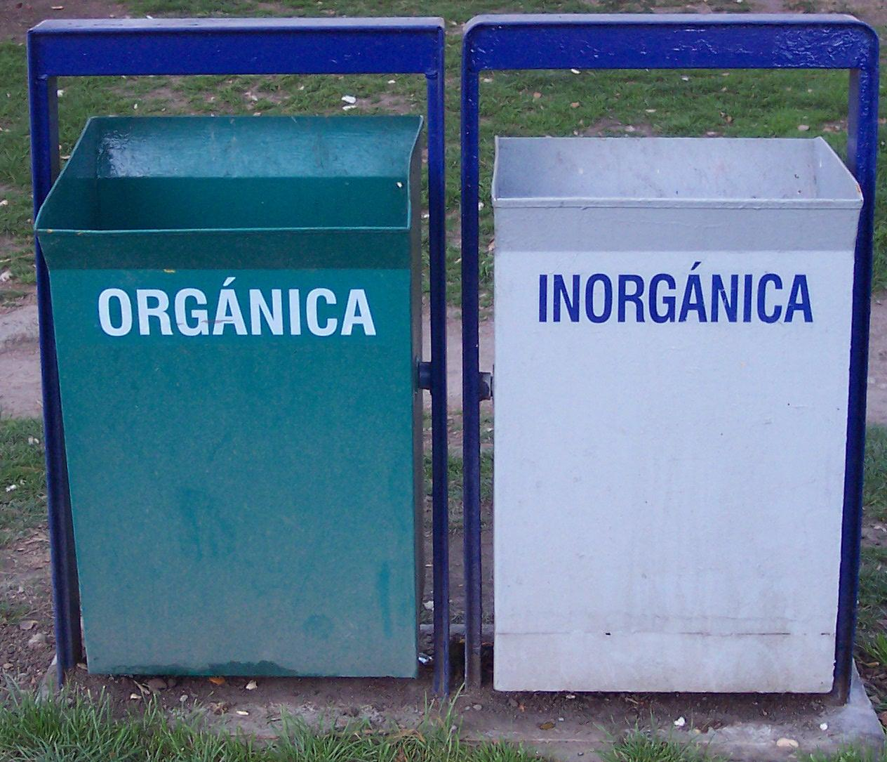 Image contains spanish text. Par de contenedores para desechos sólidos (basura): Verde, orgánicos; gris, inorgánicos. Contenedores ubicados en CU, UNAM, México.